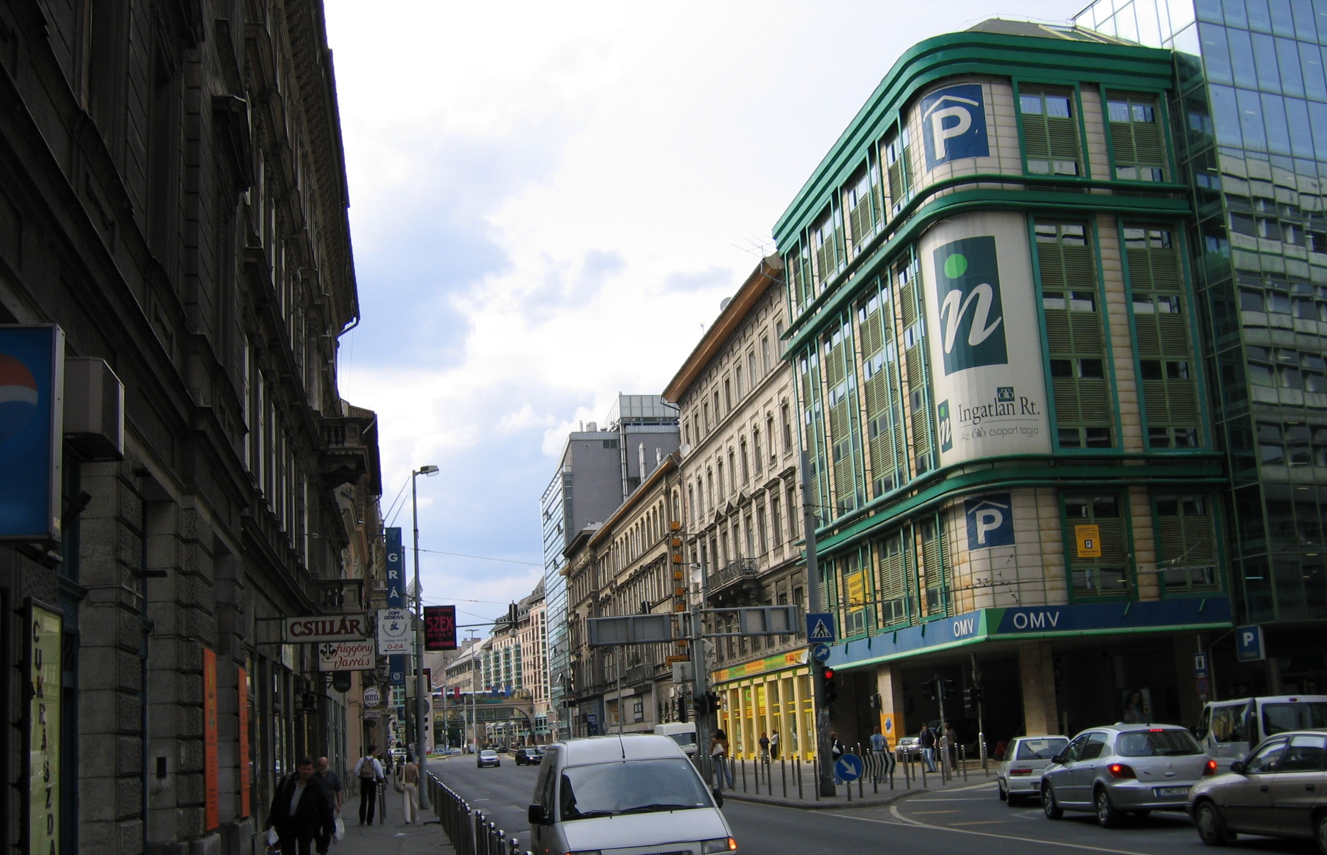 Üllői Street, Budapest, Hungary